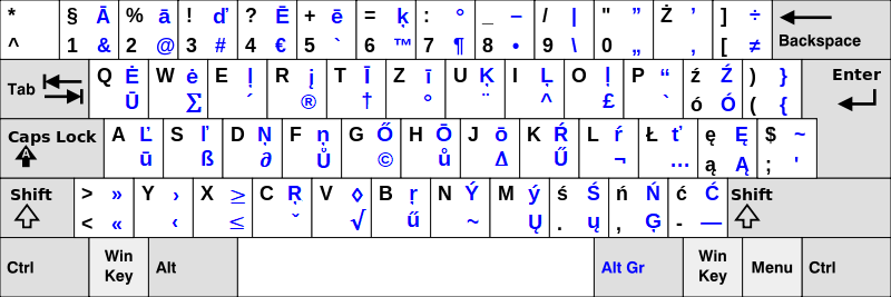 Polski układ klawiatury w Macintoshu - pełna wersja